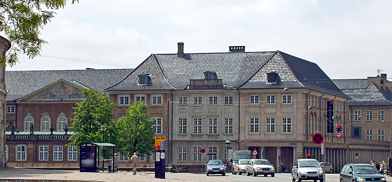 Prinsens Palais i København, som idag huser Nationalmuseet.